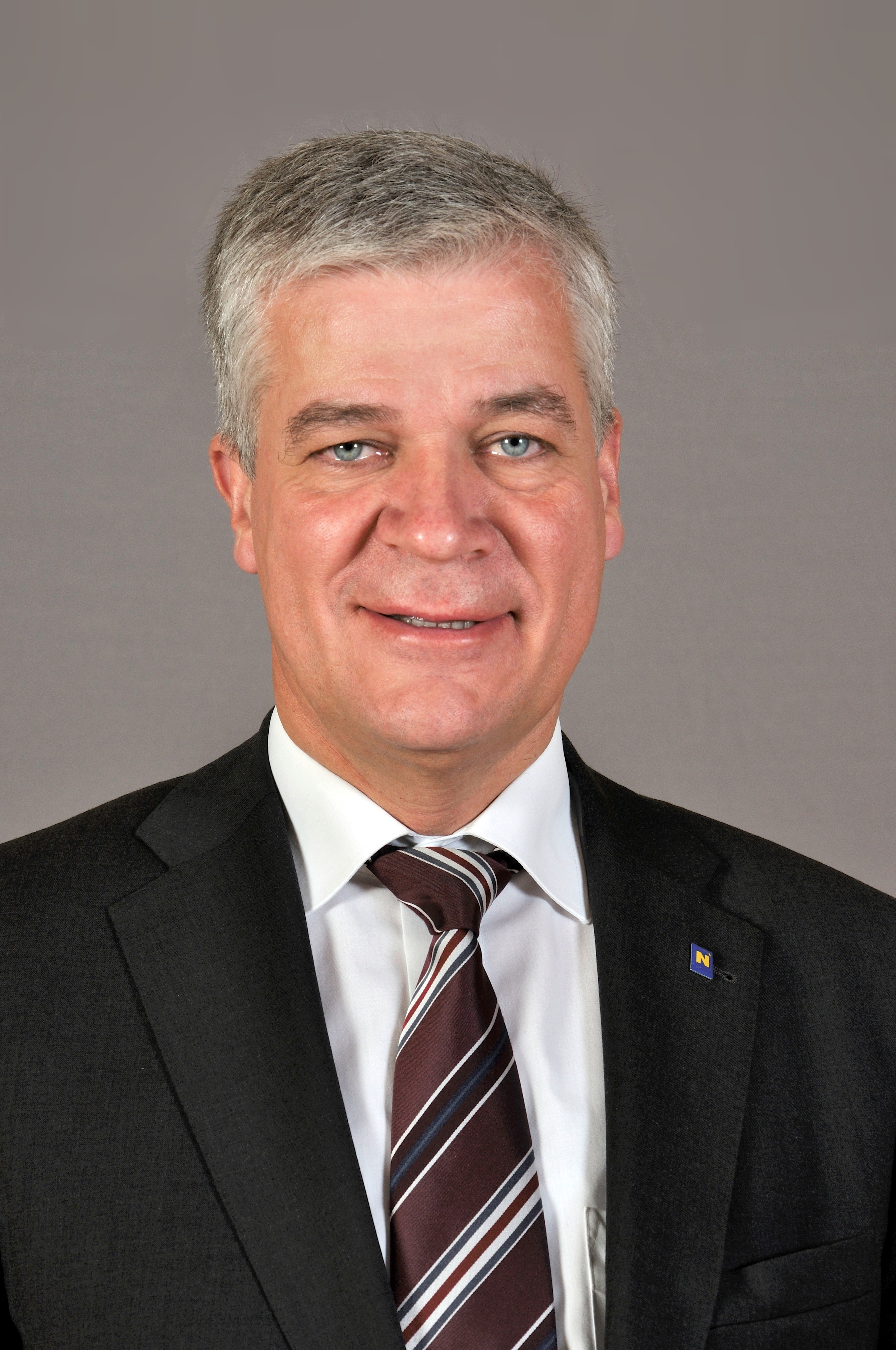 Anton Kasser, Abgeordneter zum Niederösterreichischen Landtag.